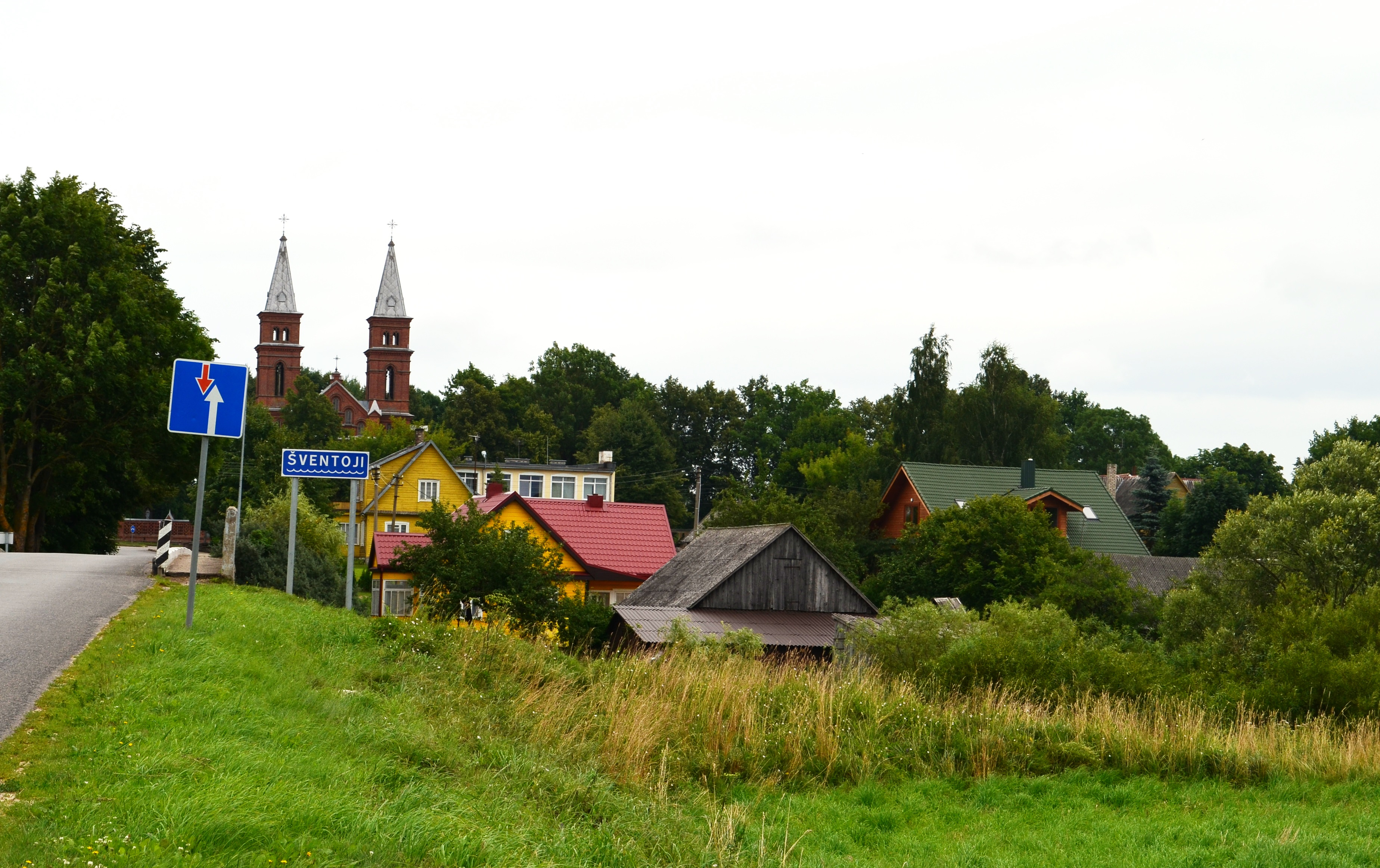 Užpaliai nuo Jūžintų pusės, tiltas per Šventąją, Utenos r.